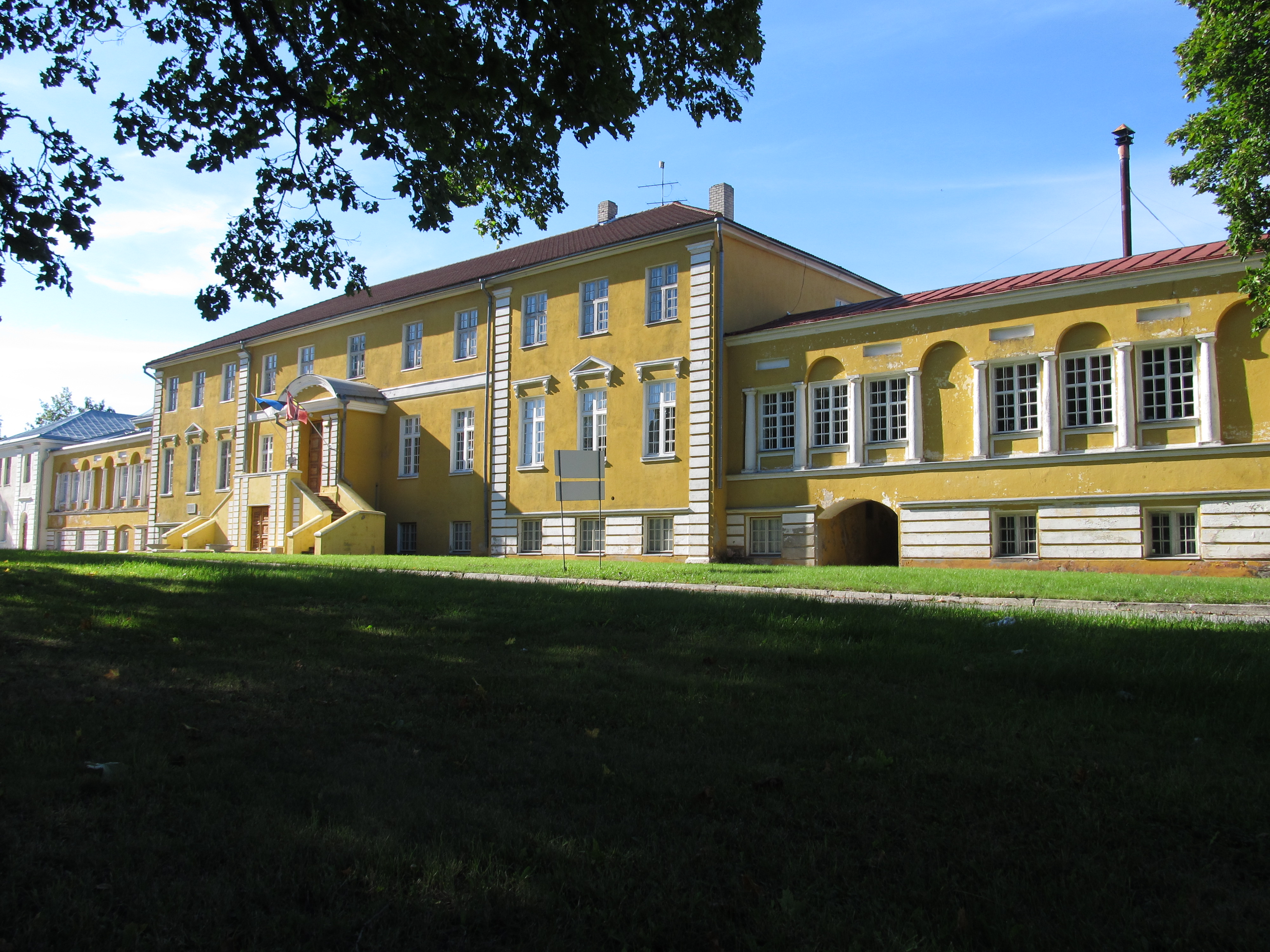 Uuemõisa mõisa peahoone eest